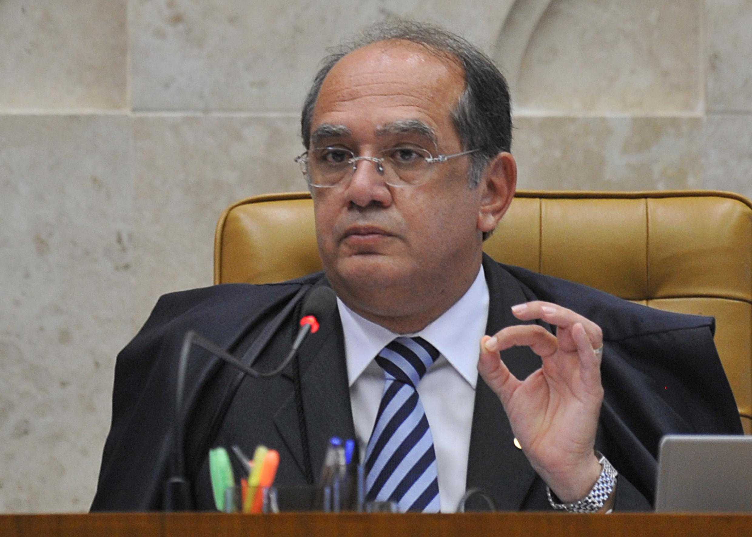 Brasília - O presidente do Supremo Tribunal Federal, ministro Gilmar Mendes, durante sessão que retoma o julgamento do pedido de extradição do escritor italiano e ex-ativista político Cesare Battisti Foto: Fabio Rodrigues Pozzebom/ABr